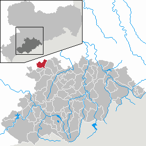 Erlbach-Kirchberg im Erzgebirgskreis, Sachsen